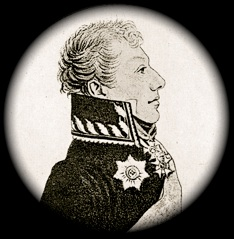 Charles Jean Baptiste de Suremain, General Major au service de la Suede, 1762-1835